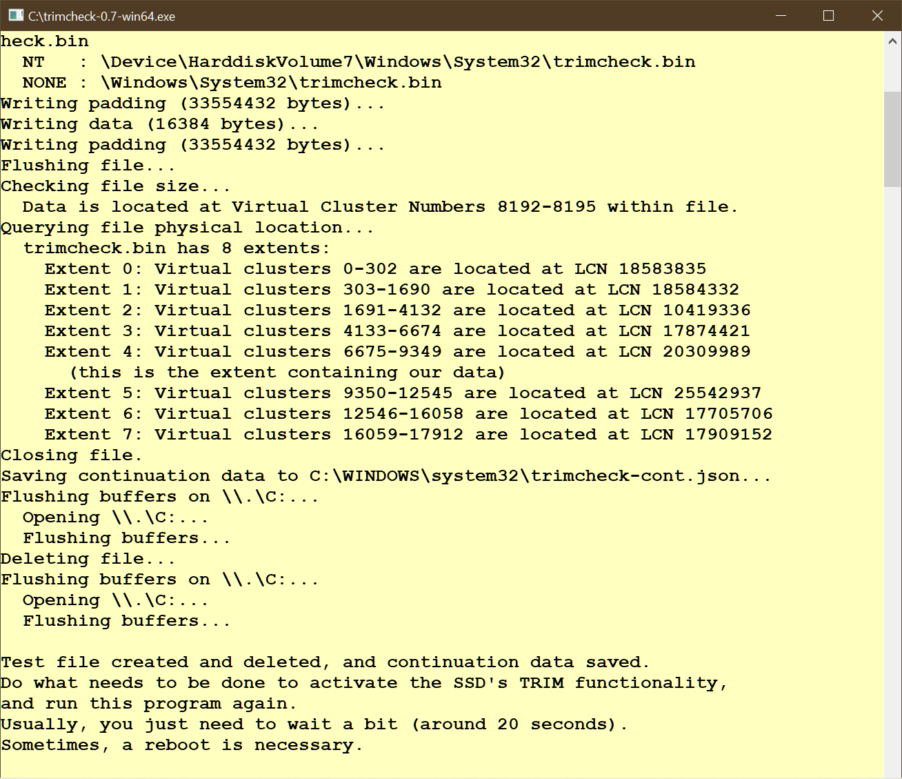 Exemple d'utilisation de "trimcheck", logiciel de Vladimir Panteleev mis à disposition sur Sourceforge, et destiné à vérifier si le TRIM est bien actif sur un SSD (ce qui peut ne pas être toujours le cas quand ce SSD est branché en USB externe)